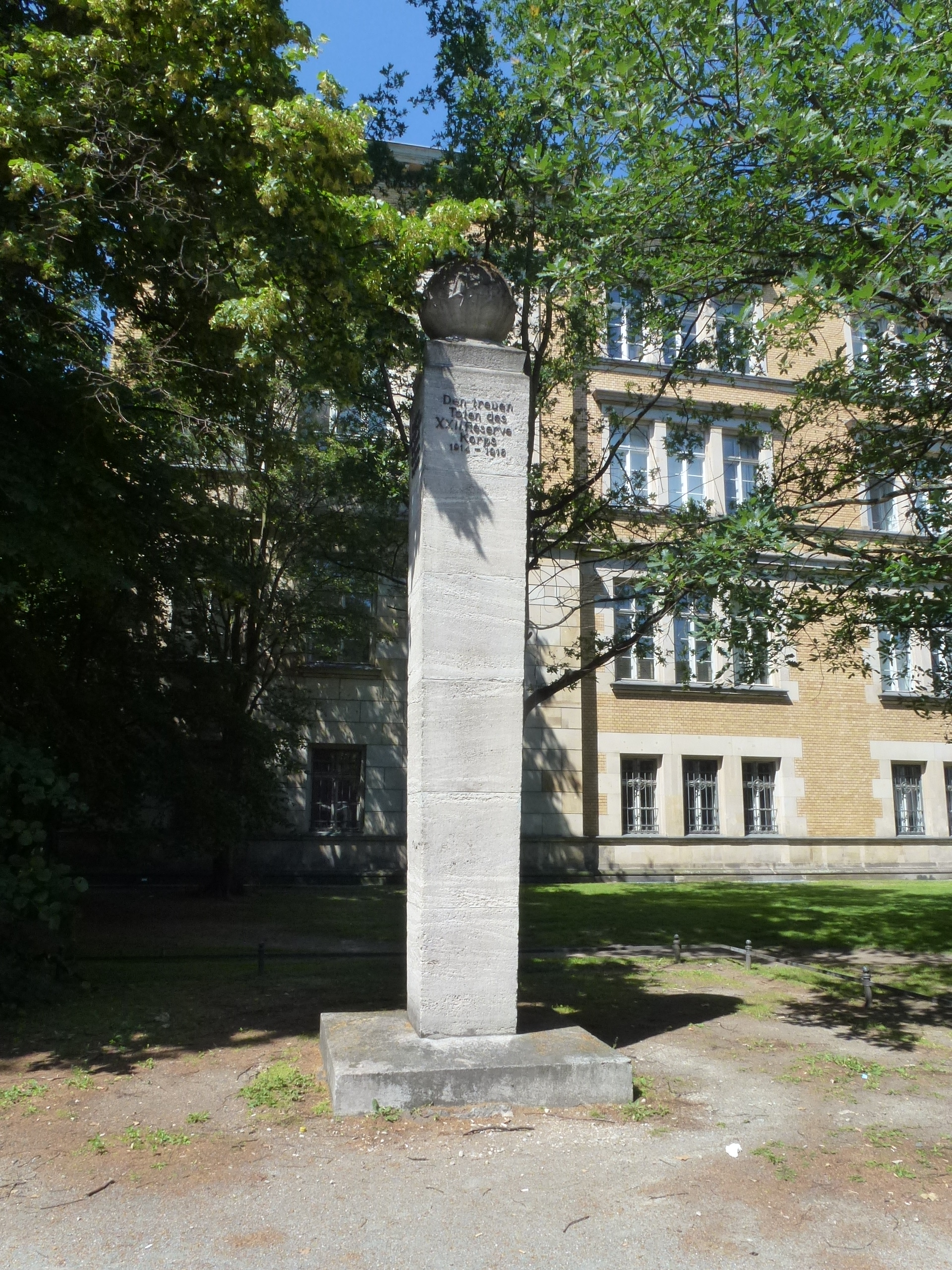 Berlin-Wilmersdorf Bundesallee Gedenkstele XXII. Reserve Korps